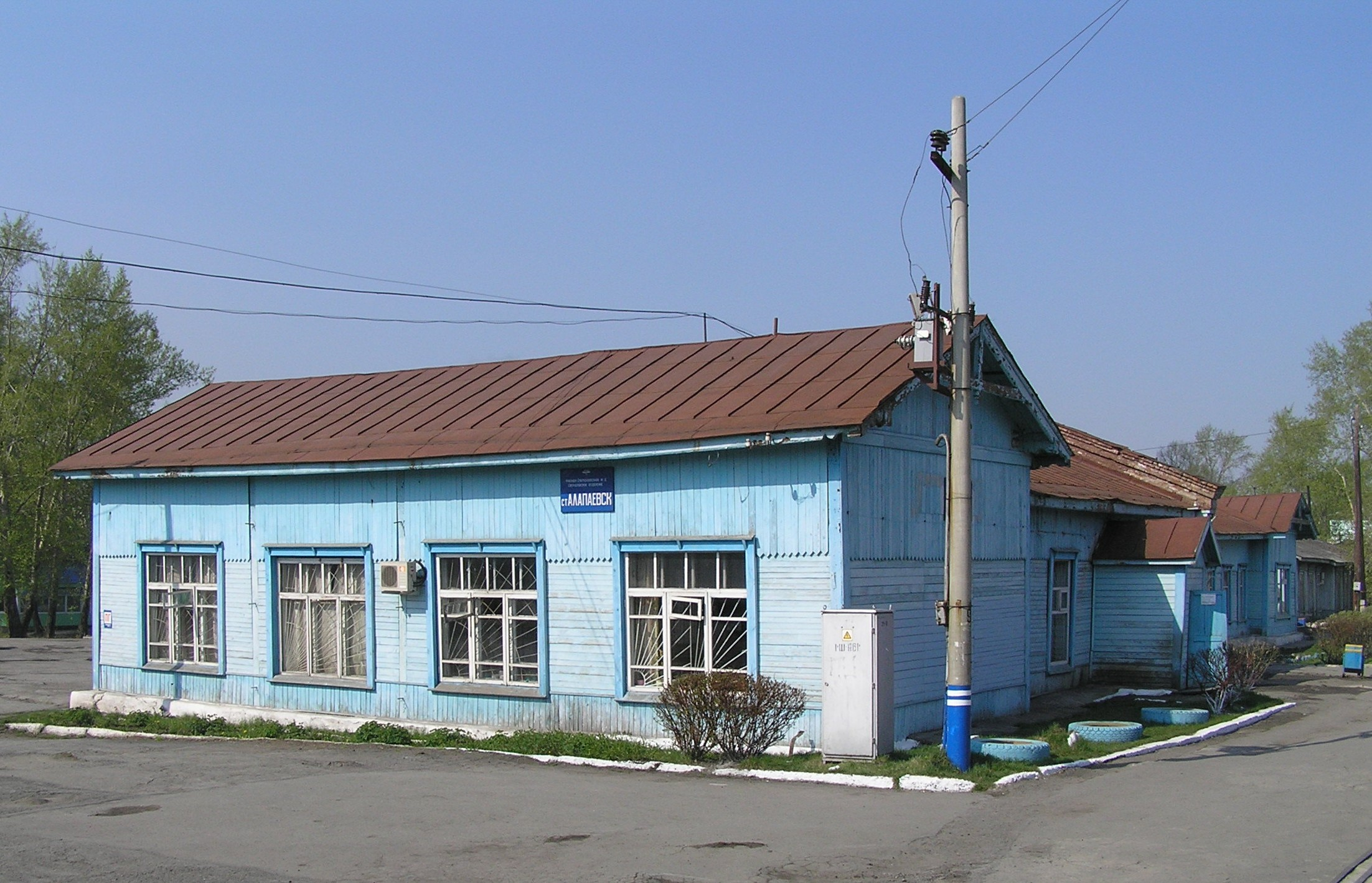 ст. Алапаевск, Свердловская ж.д.